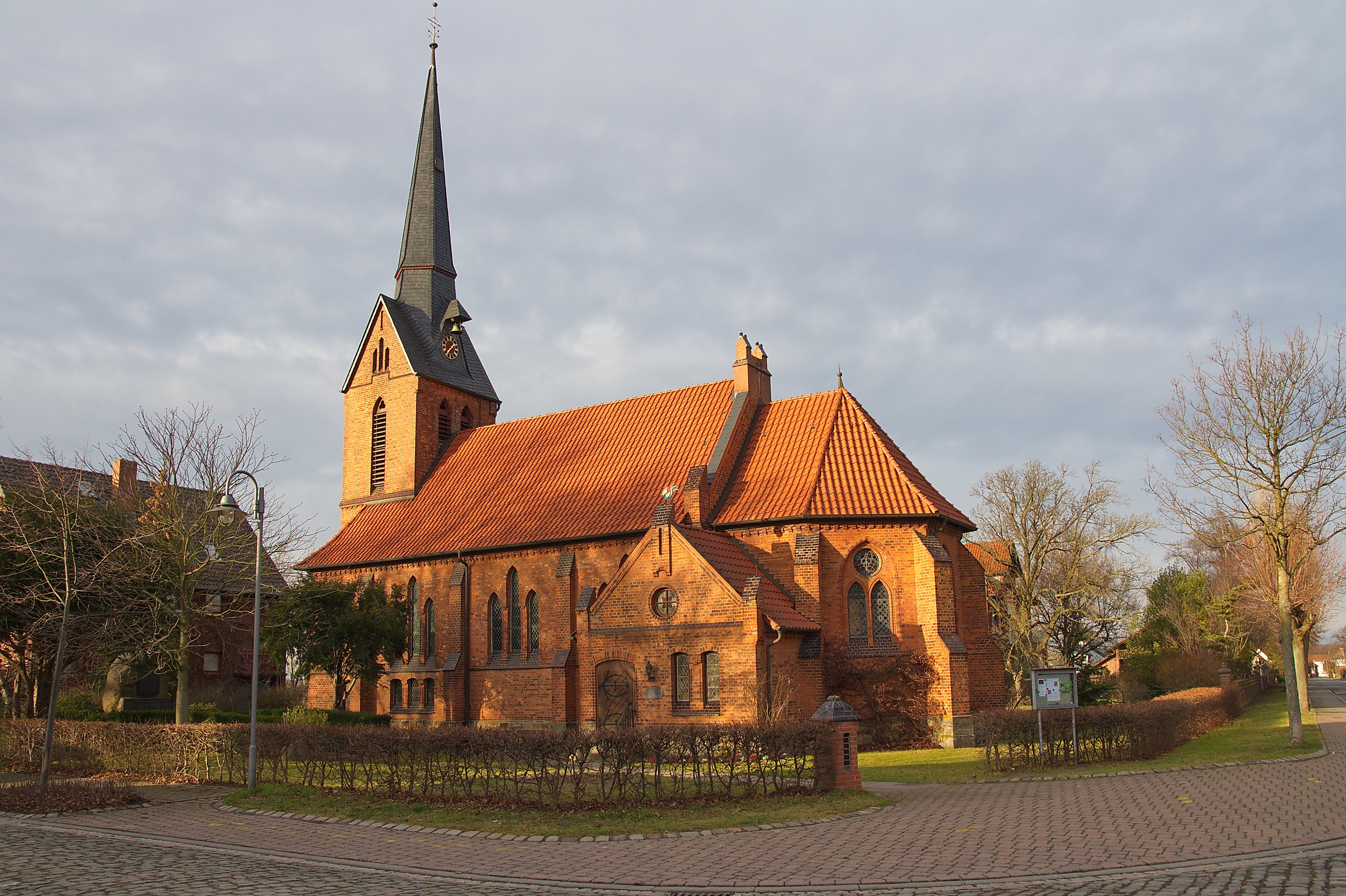 Von Conrad Wilhelm Hase im Jahr 1897 errichtete Kirche in Dedensen (Seelze), Niedersachsen, Deutschland.